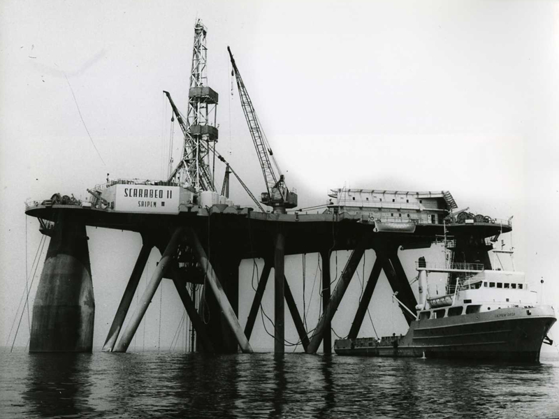 Saipem costruzione piattaforma Scarabeo II nel Mare Adriatico 1967